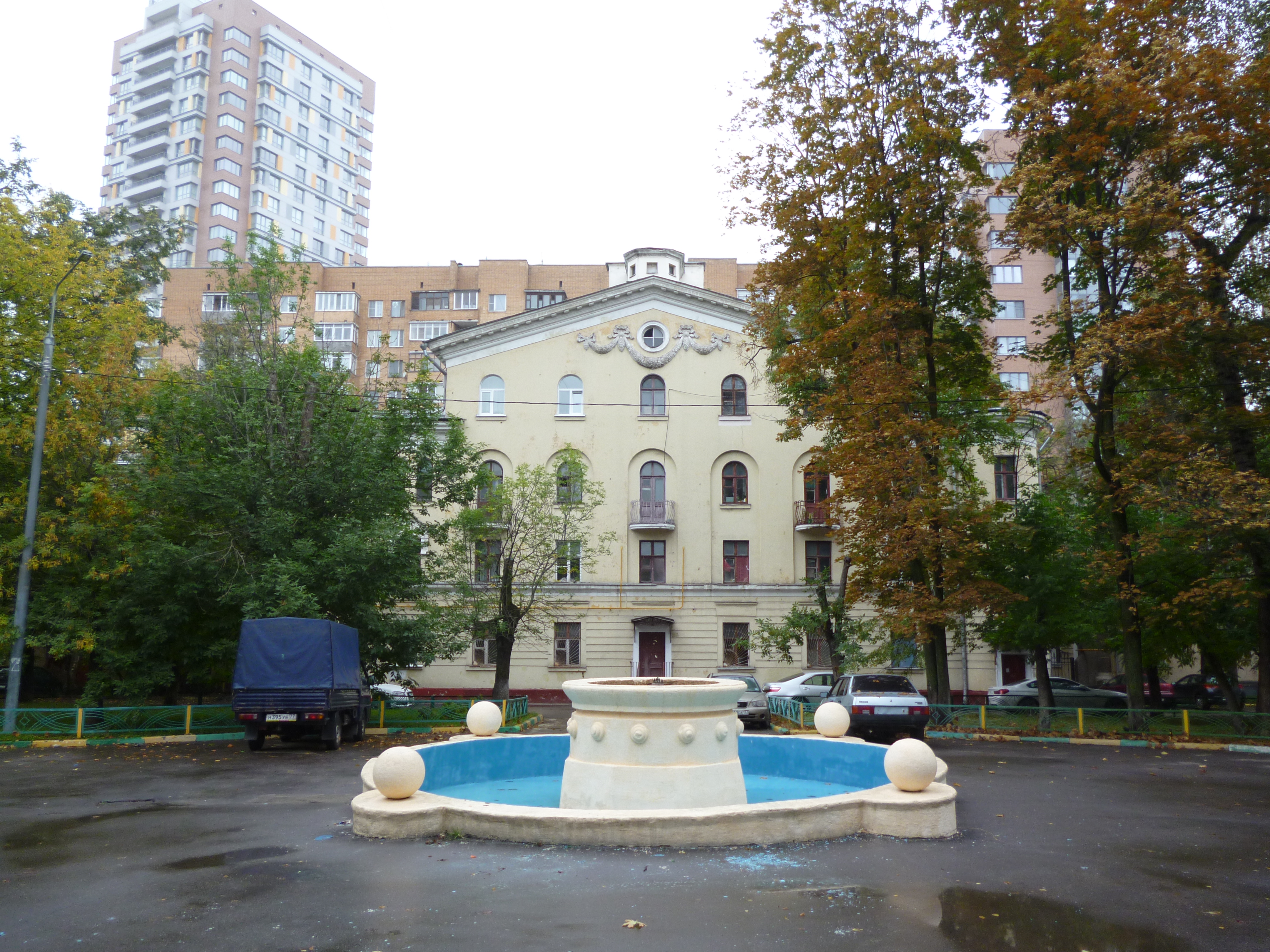 Жилой дом: Конева Маршала ул., дом 9, Щукино, Северо-западный округ, Москва